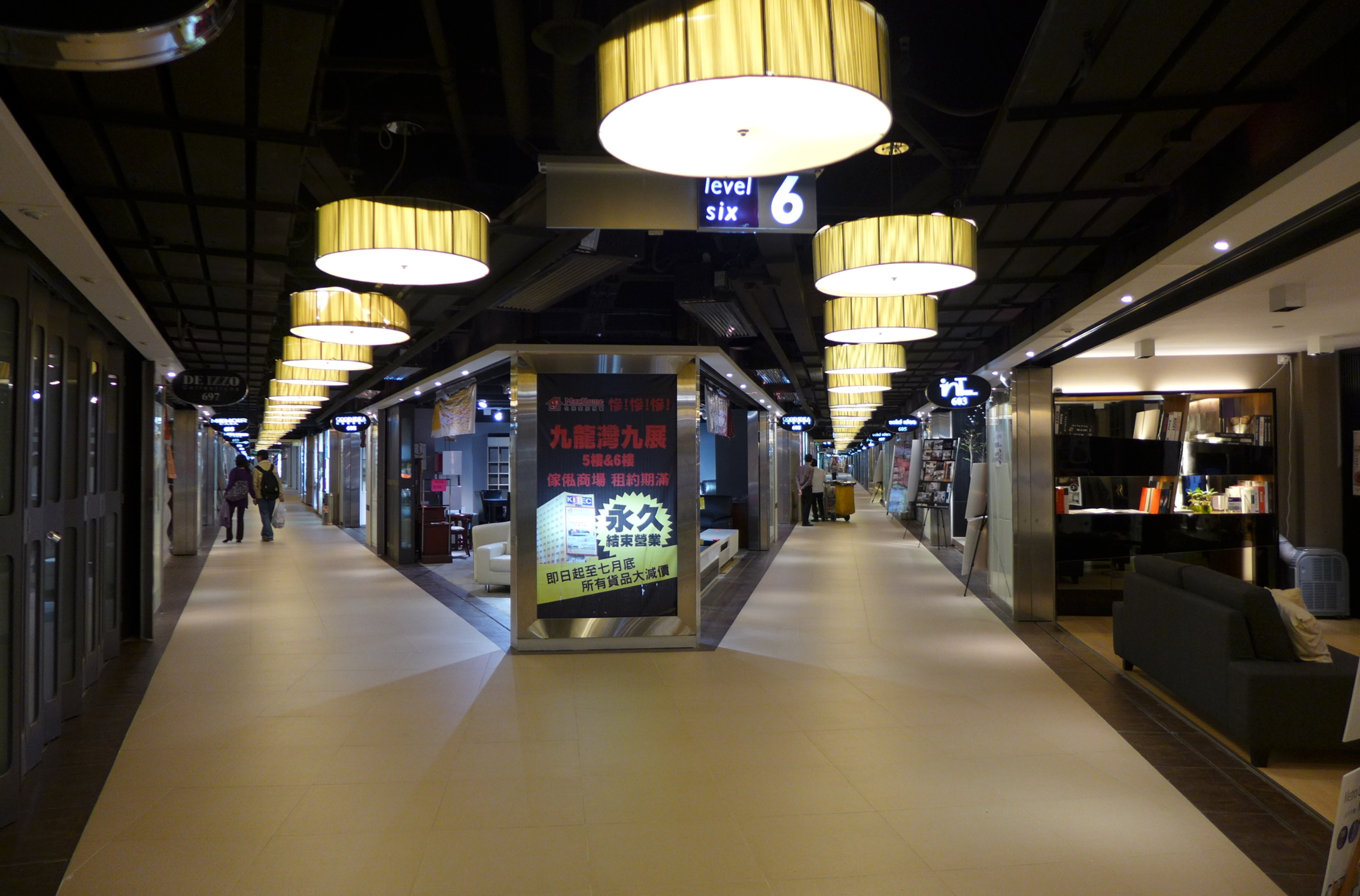 EMax MaxHome